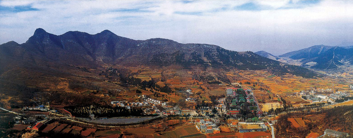 登封嵩山局部